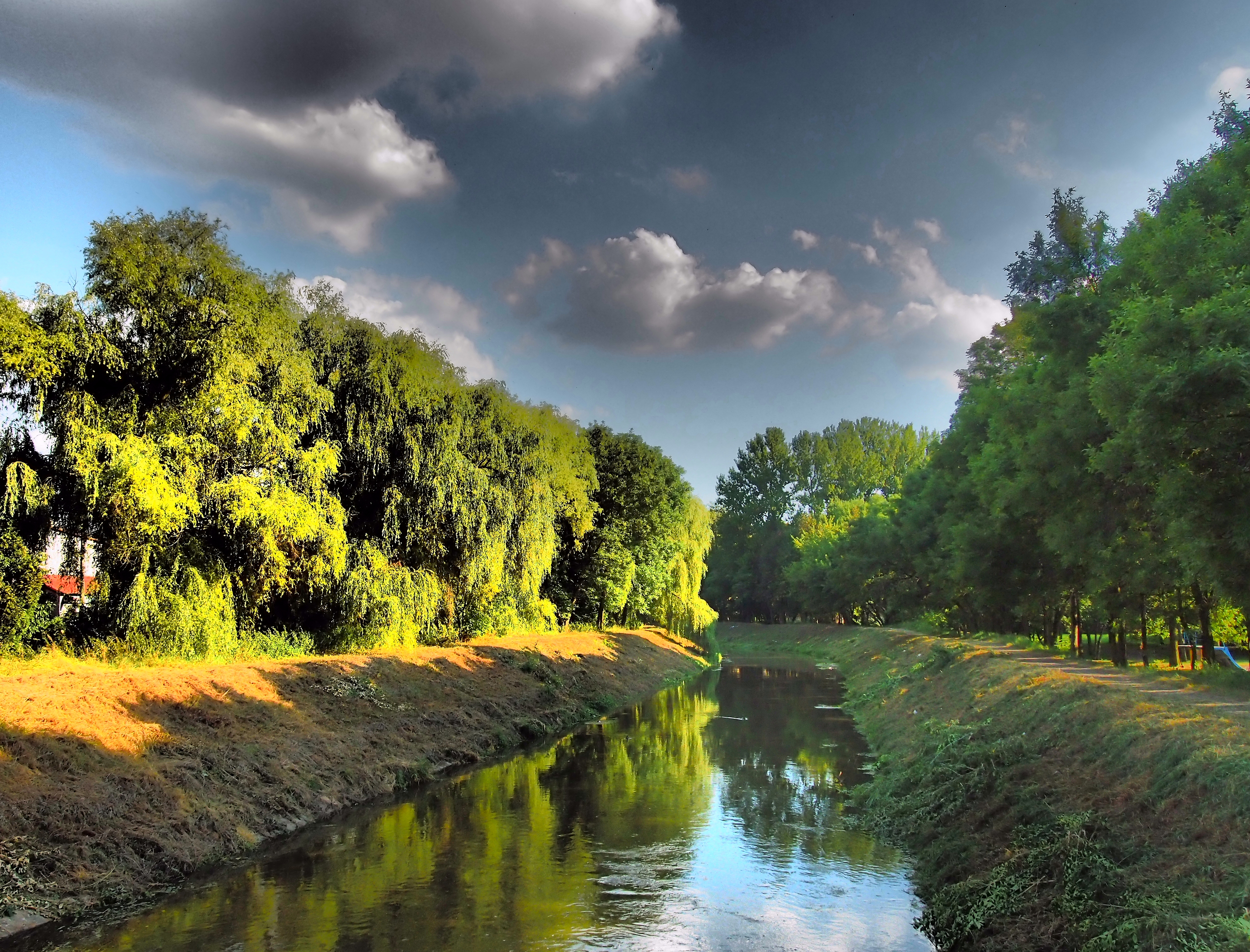 Park Grabek w Czeladzi.